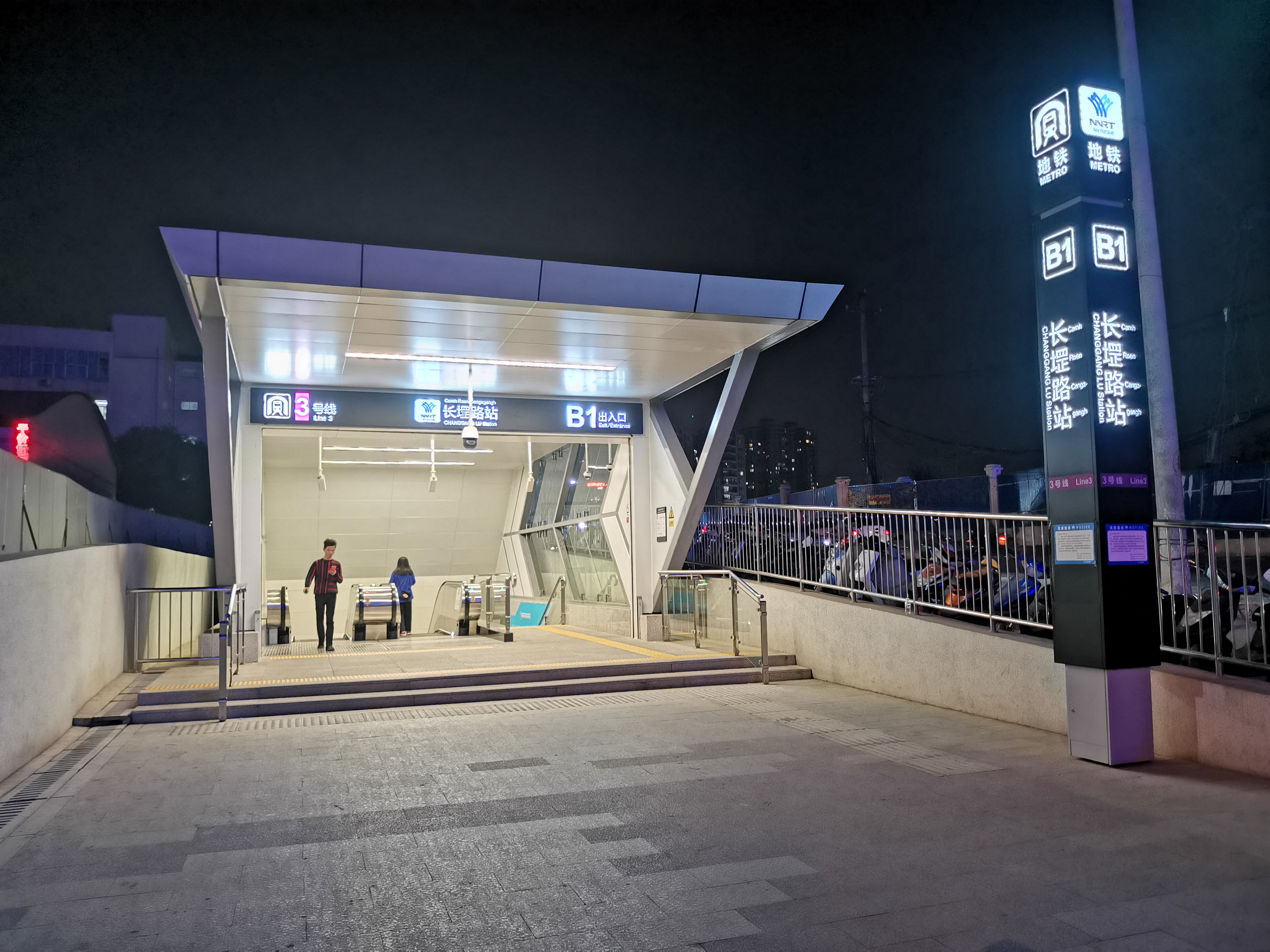 南宁轨道交通3号线长堽路站采光口